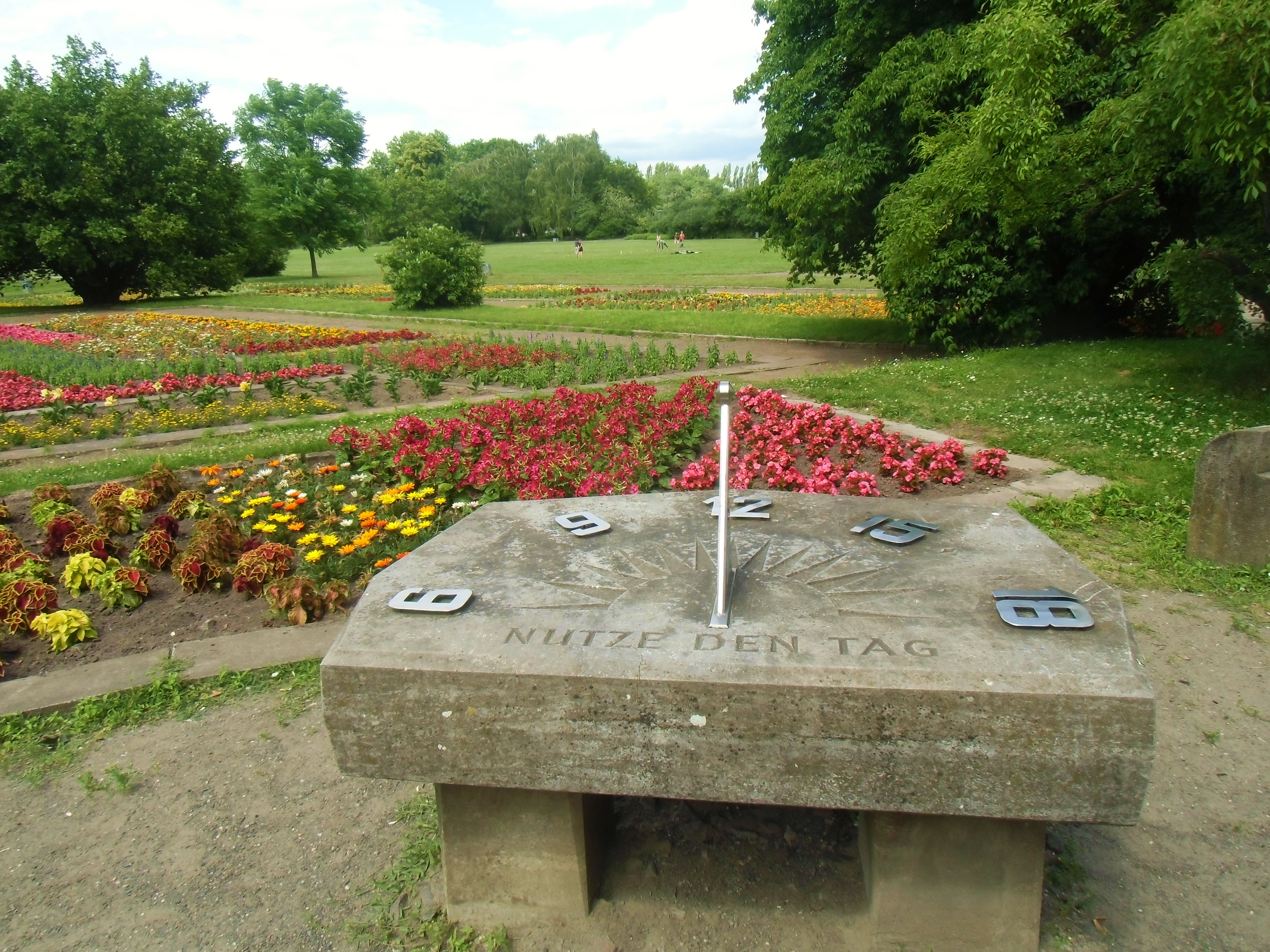 Sonnenuhr im denkmalgeschützten Treptower Park in Berlin